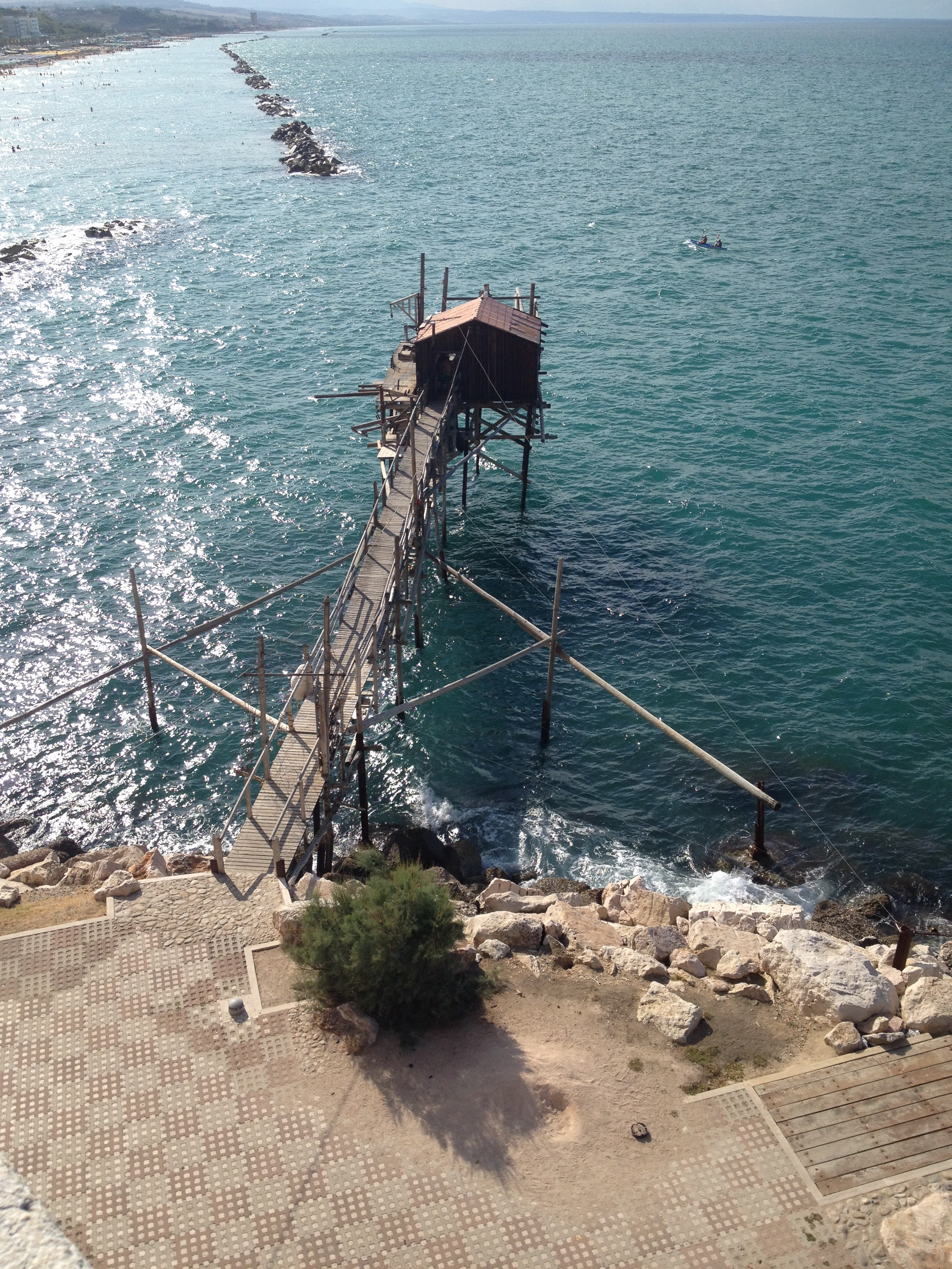 trabocco/trabucco, lungo le mura del centro storico di Termoli